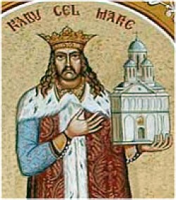 Radu cel Mare